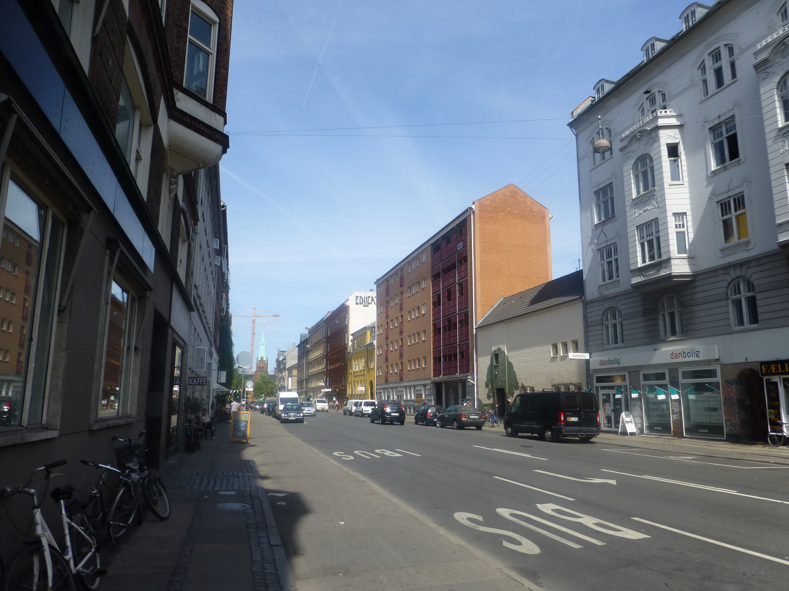 The street Fælledvej in Nørrebro in Copenhagen.